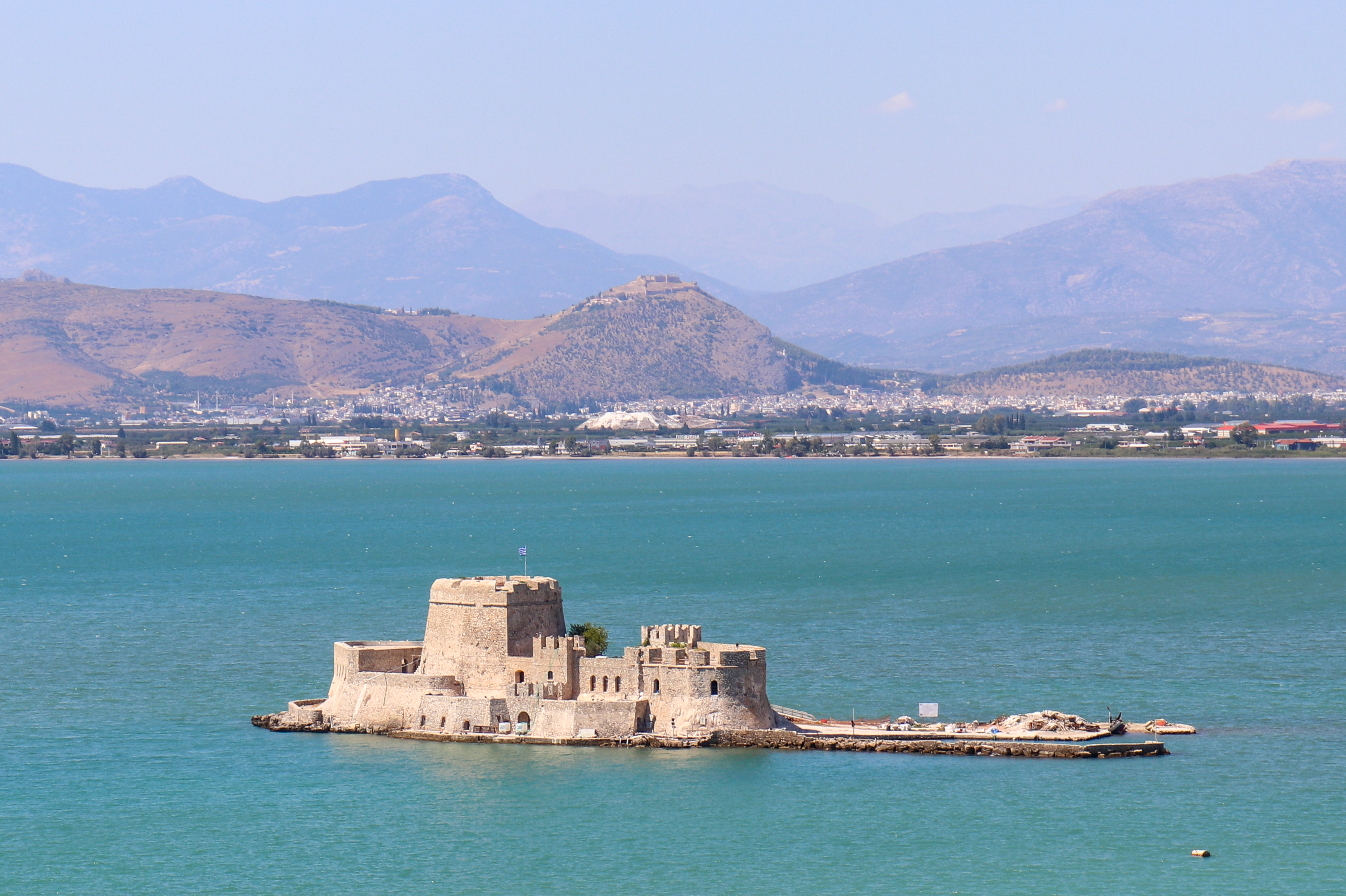 Акронафплия, Нафплион. Форт Бурдзи.